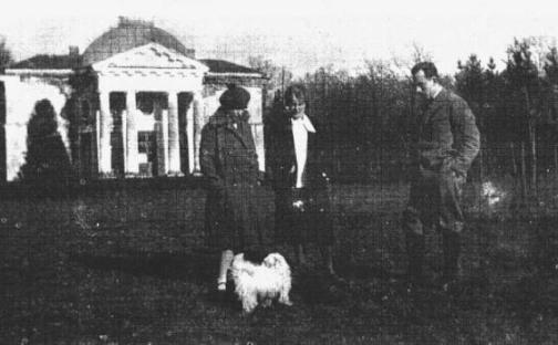 Представление о ней даёт одна из литографий с акварели Наполеона Орды (1865) и записи Ю.Немцевича, который посетил усадьбу в 1819 г. Центральное положение в усадьбе занимал дворец, расположенный среди парка. От него, по воспоминаниям Ю. Немцевича, которого принимал Войтех, открывалась живописная панорама на озеро, противоположный берег которого казался «... бледной, голубой полосой, которая местами прерывалась зелёным гаем. Стаи птиц, белые паруса рыбацких лодок ещё более подчёркивали живописность ландшафта». Дворец имел богатое собрание картин кисти отечественных и зарубежных художников, архив, библиотеку в основном французских и польских изданий, собрание древних рукописей, коллекцию оружия. Ю.Немцевич упоминает ещё красивый костёл, построенный Войтехом Пусловским в «четвёртой части мили от дворца», в котором имелось редкое собрание икон.